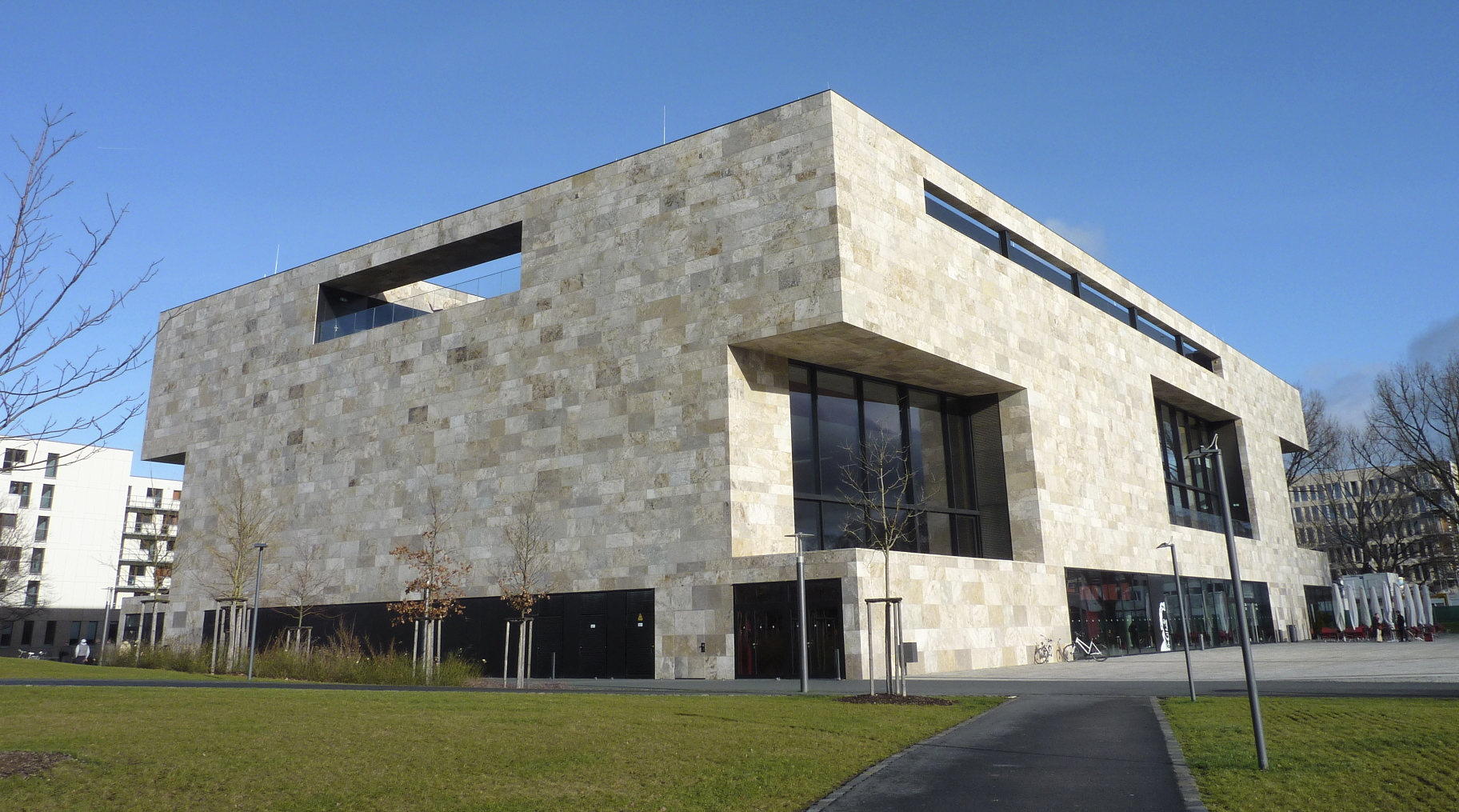 Stadt Frankfurt am Main, Johann-Wolfgang-von-Goethe-Universität: Ansicht des Uni-Campus Westend im Stadtteil Westend-Nord. Das Foto zeigt das Gebäude des Hörsaalzentrums („HSZ“; Architekt: Ferdinand Heide, Frankfurt), Ansicht von Südwesten.